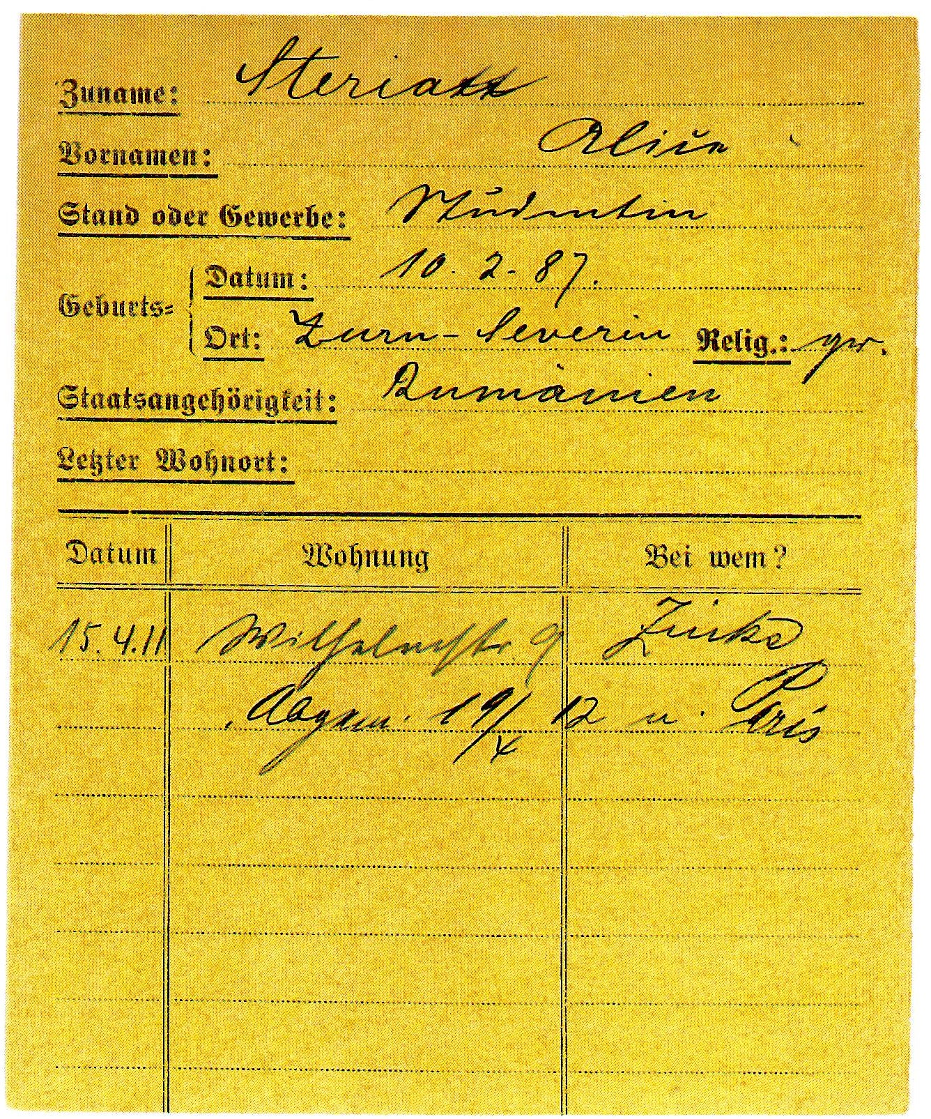 Kopie der Meldekarte von Alice (Voinescu) Steriade als Studentin in der Stadt Marburg 1911/12